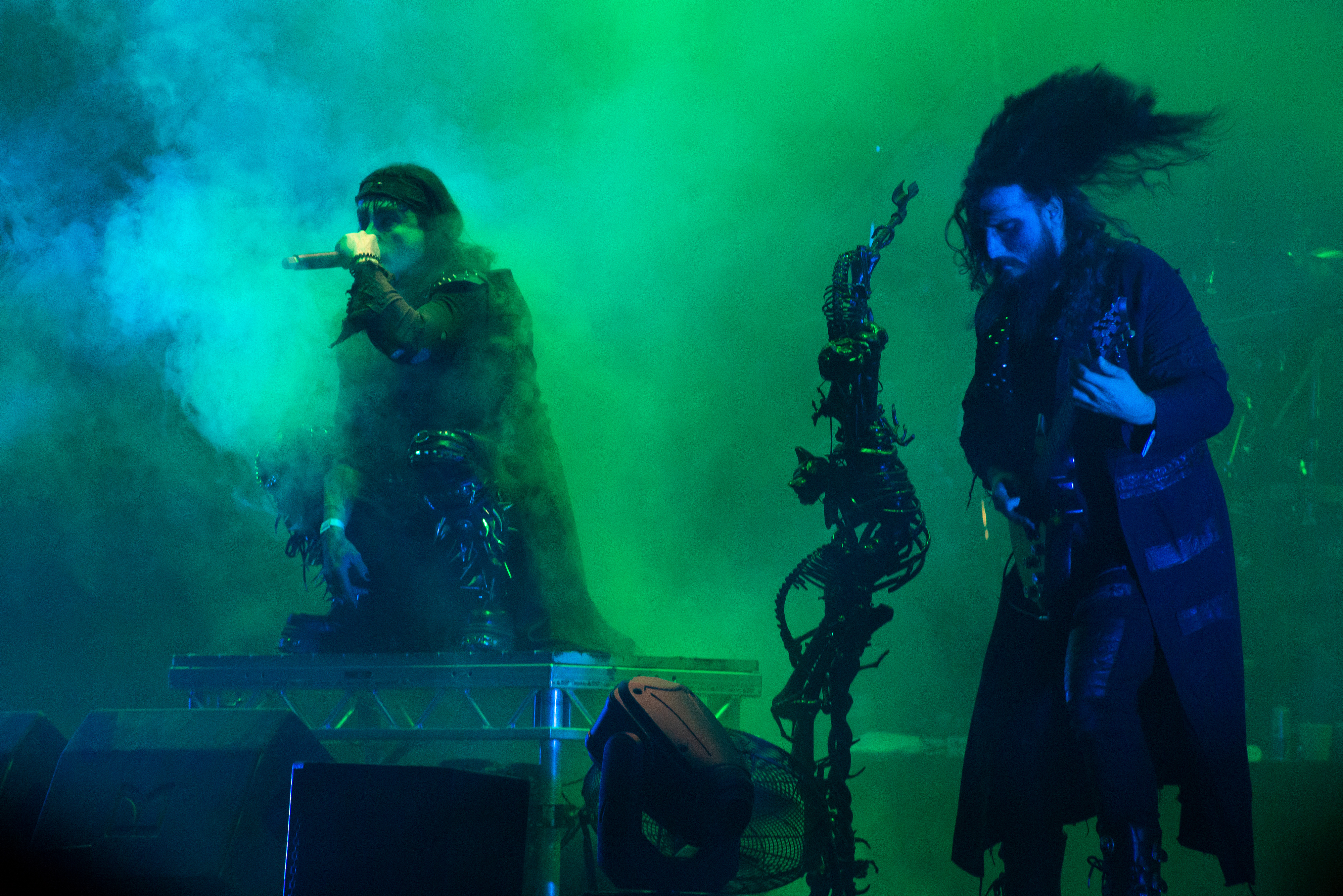 Concert du groupe britannique Cradle of Filth au Hellfest 2019.